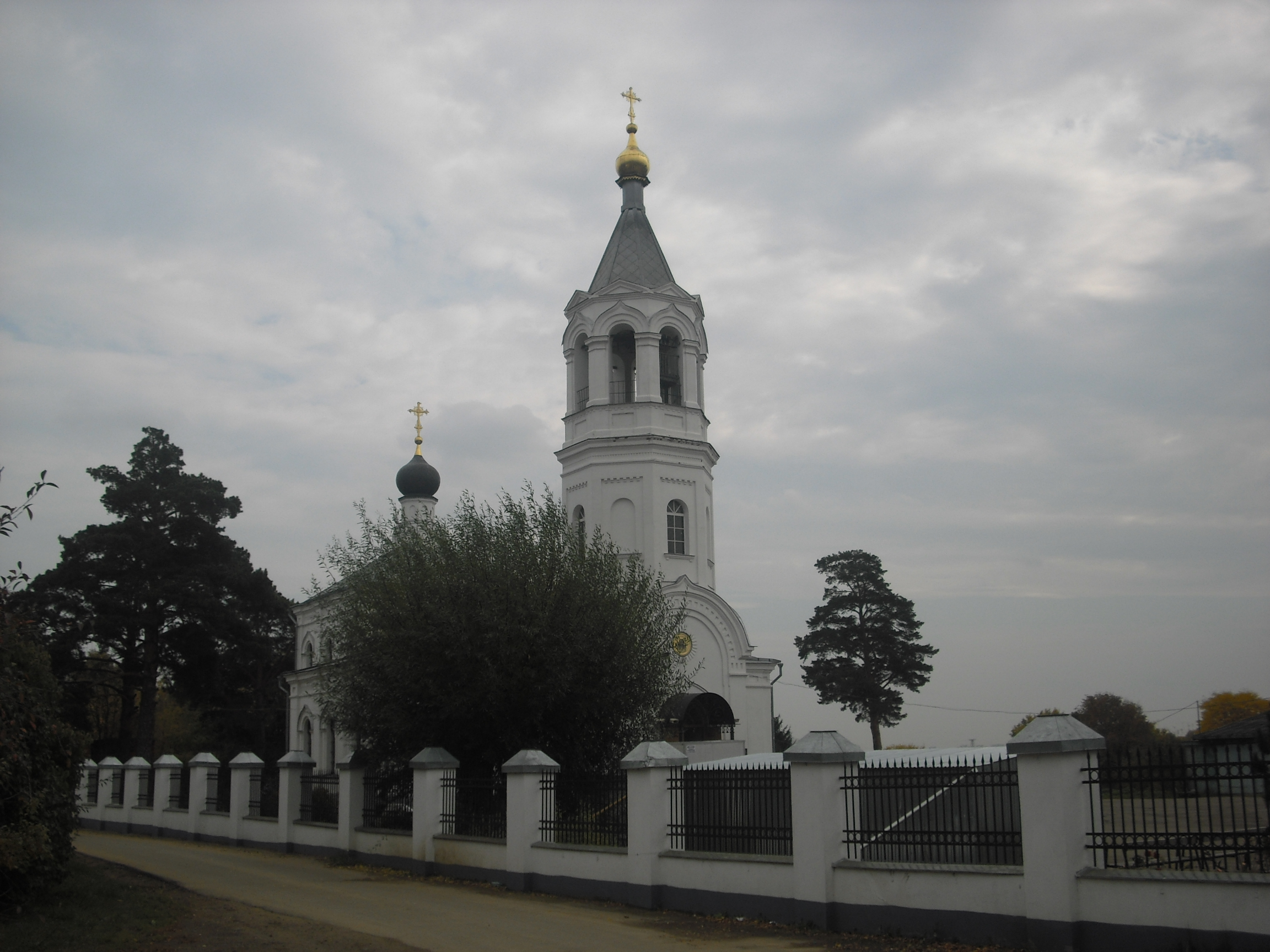 Церковь Рождества Христова в селе Рождествено (р-н Митино, Москва, Россия)